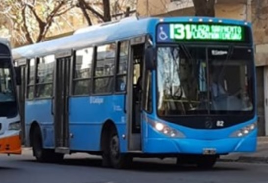 Mercedes-Benz carrozado por Metalpar de la línea 131, explotada por la empresa El Cacique Ros